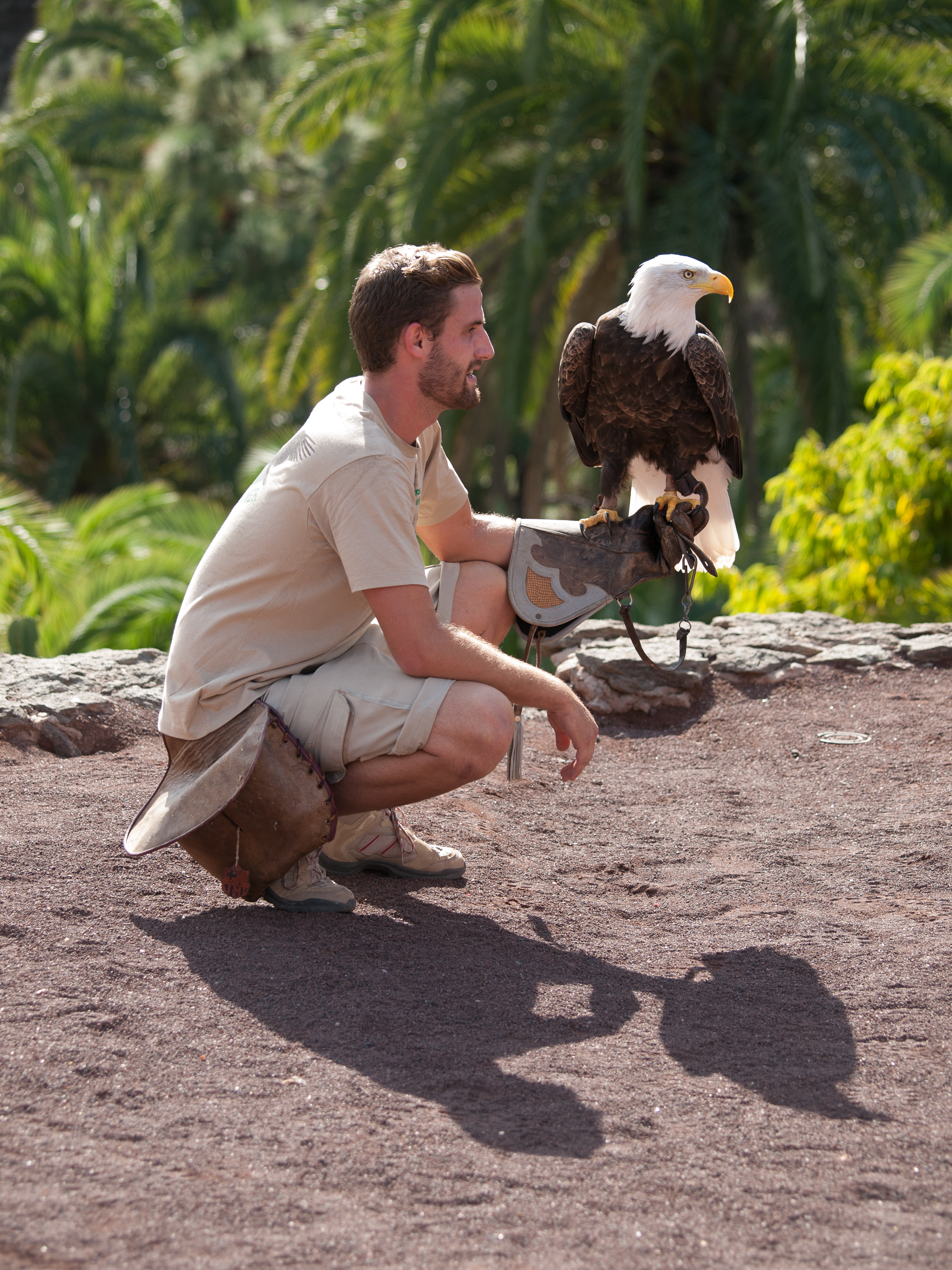 Bald eagle at Palmitos Park in Gran Canaria